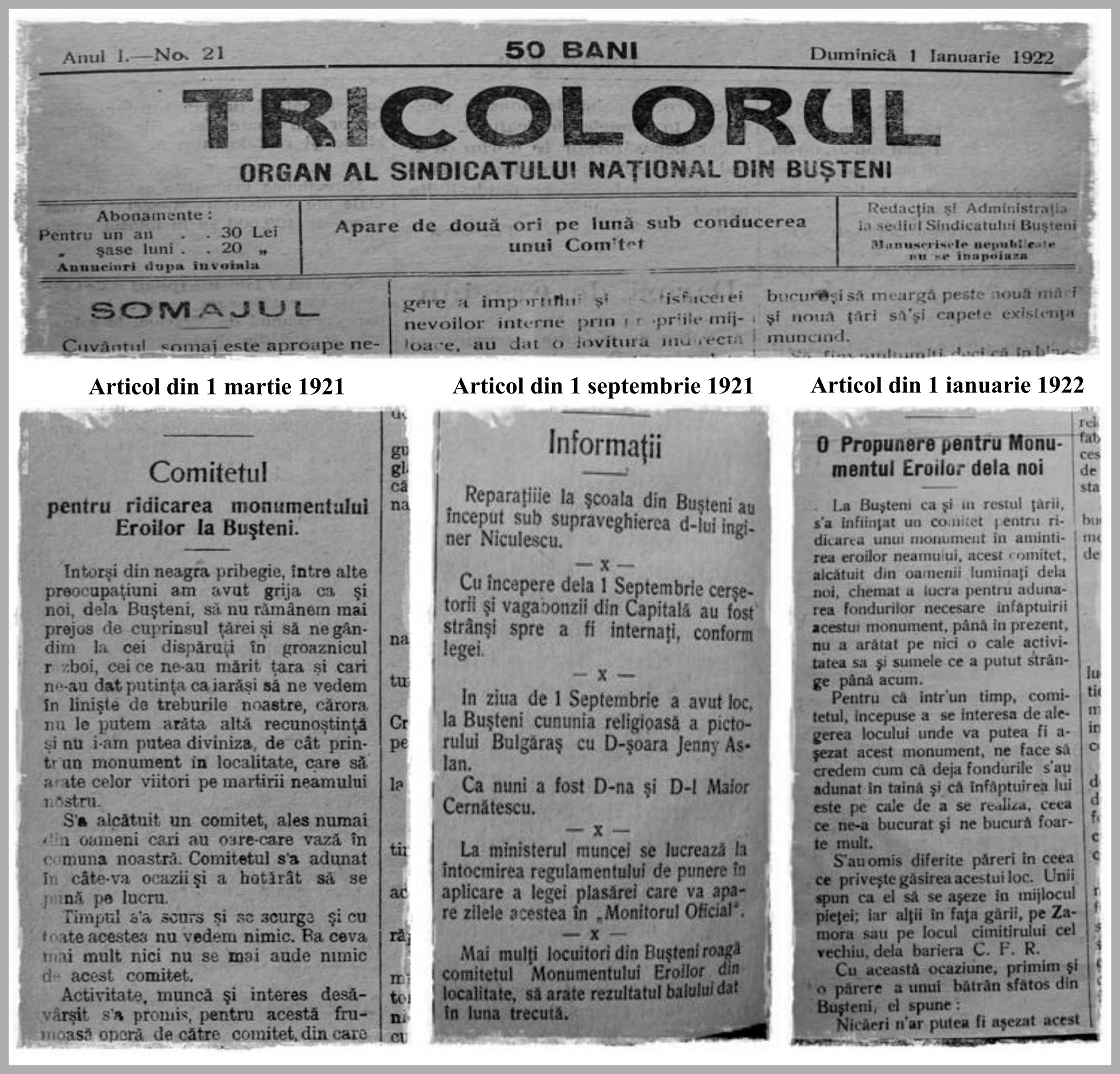 Colaj cu: antetul ziarului Tricolorul din 1 ianuarie 1922; un articol din 1 martie 1921; un articol din 1 septembrie 1921; un articol din 1 ianuarie 1922.